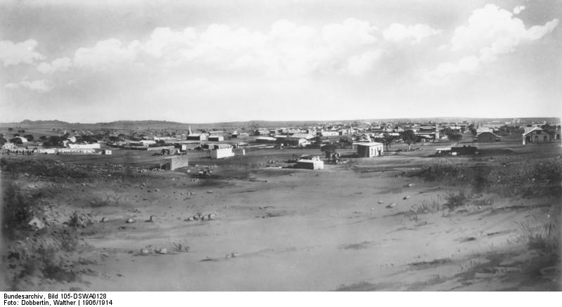 Swakopmund [?]